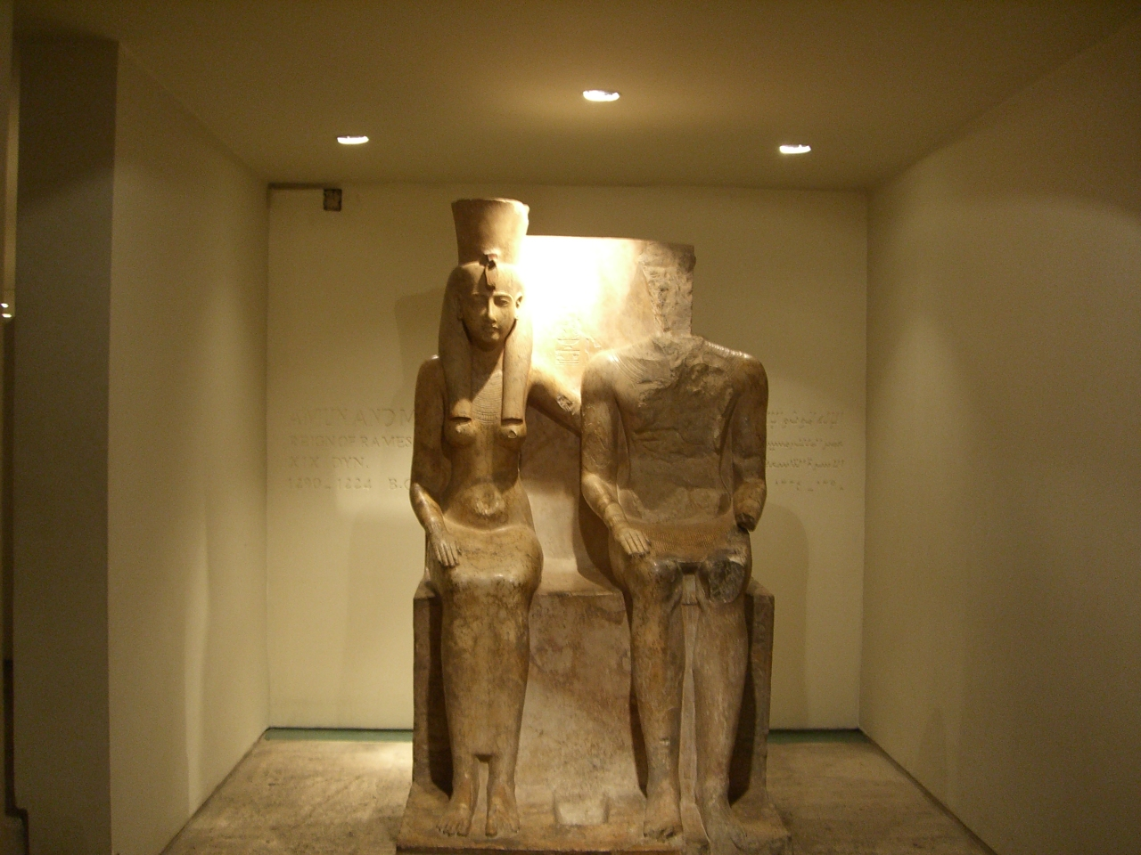 Dyade représentant le dieu Amon et la déesse Mout - Musée de Louxor